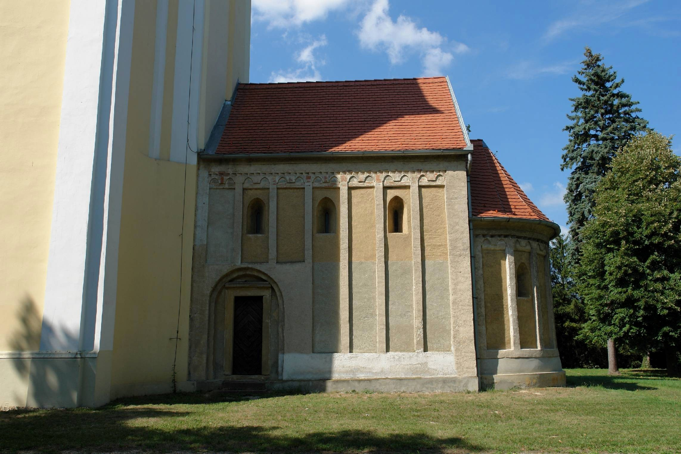 Egykori ferences templom és kápolna, Búcsúszentlászló, Arany János utca 15. This is a photo of a monument in Hungary. Identifier: 10790